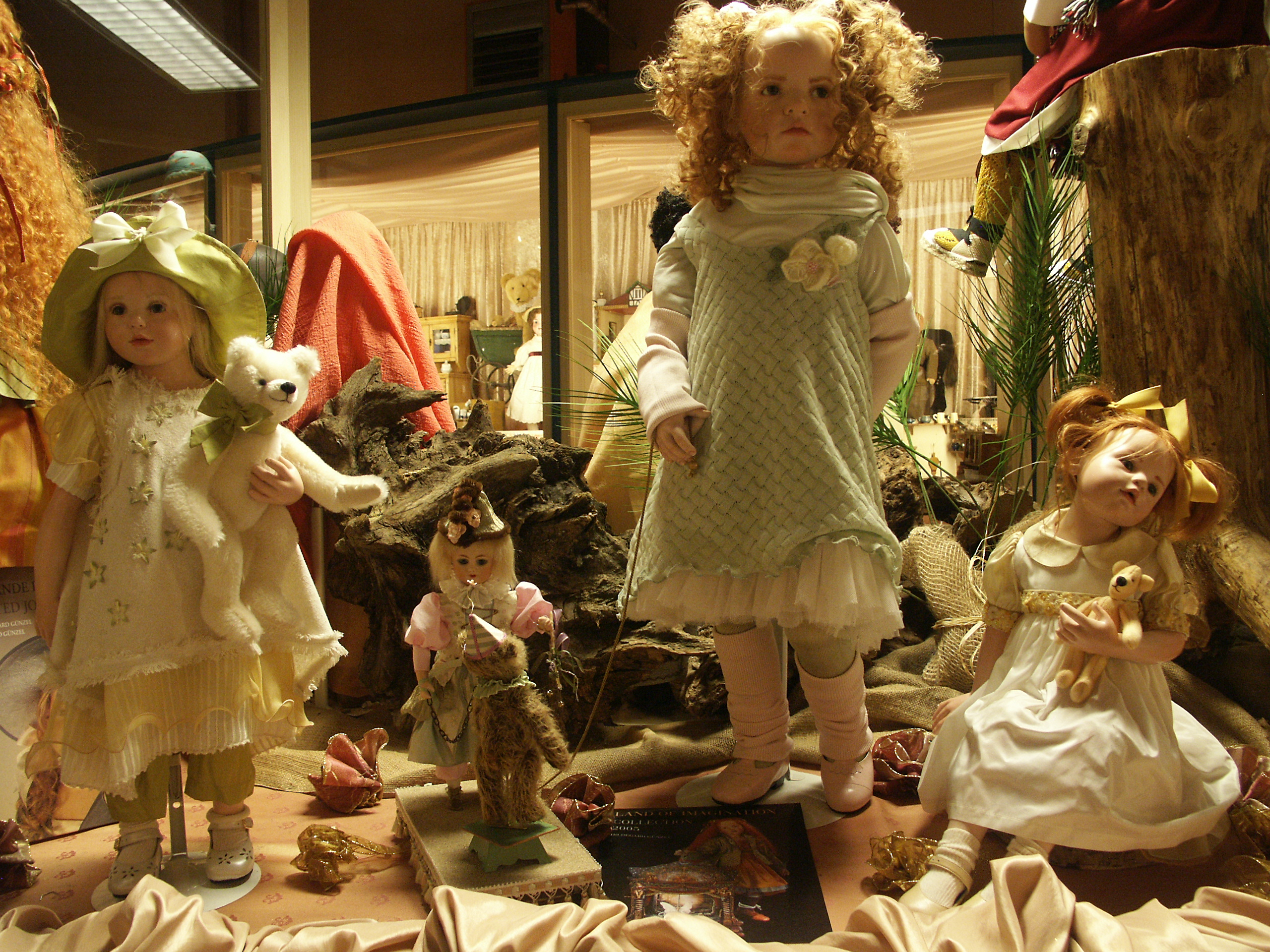 Puppen in der Arsfigura Ausstellung